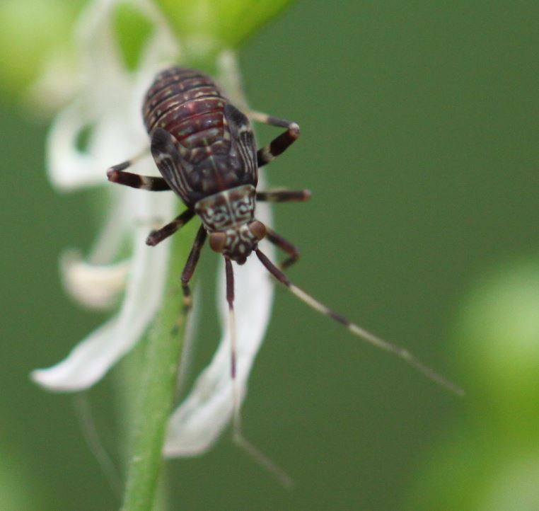 5. Nymphenstadium von Mermitelocerus schmidtii am 3. Mai 2019 in einem Wald nahe Walldorf/Baden